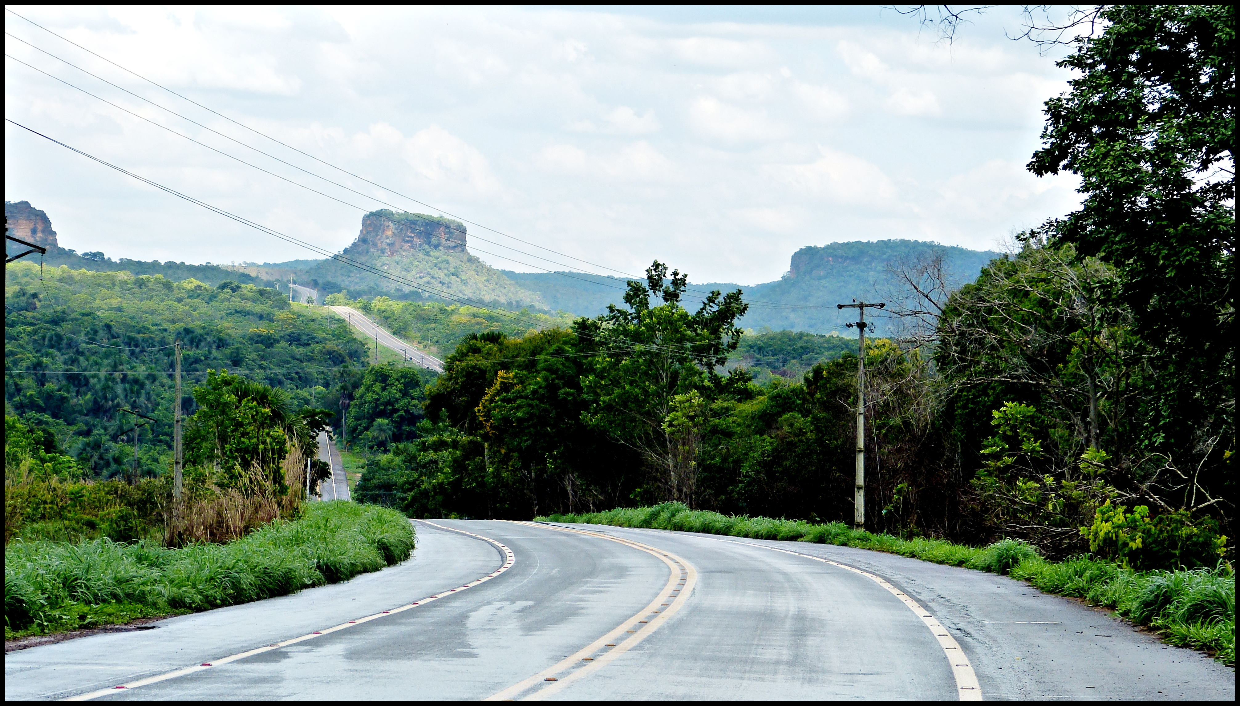 BR 230, a Estrada do Parque Nacional da Chapada das Mesas.